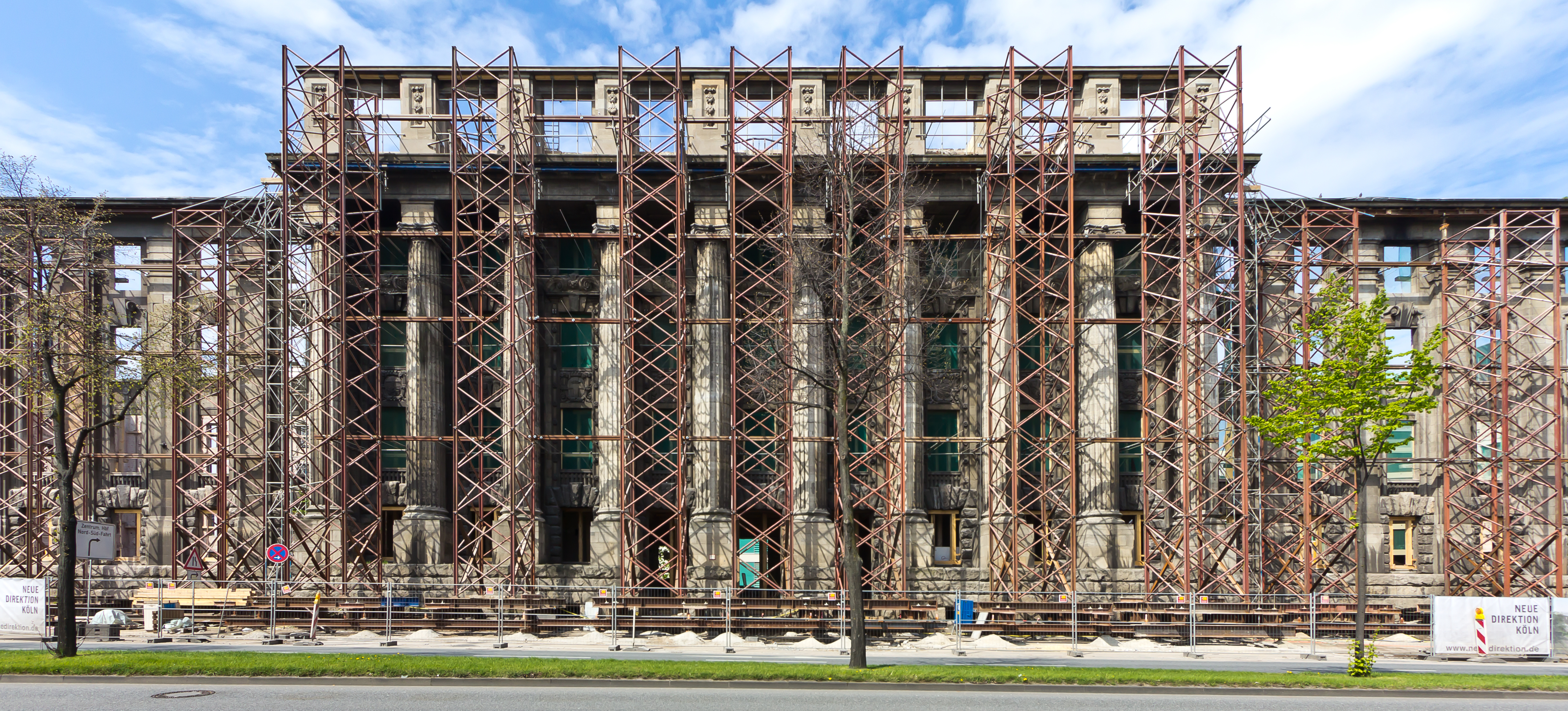 Fassade der ehemaligen Reichsbahndirektion Köln. Das Gebäude wurde im Rahmen des Umbaus zur "Neue Direktion Köln" entkernt.This is a photograph of an architectural monument.